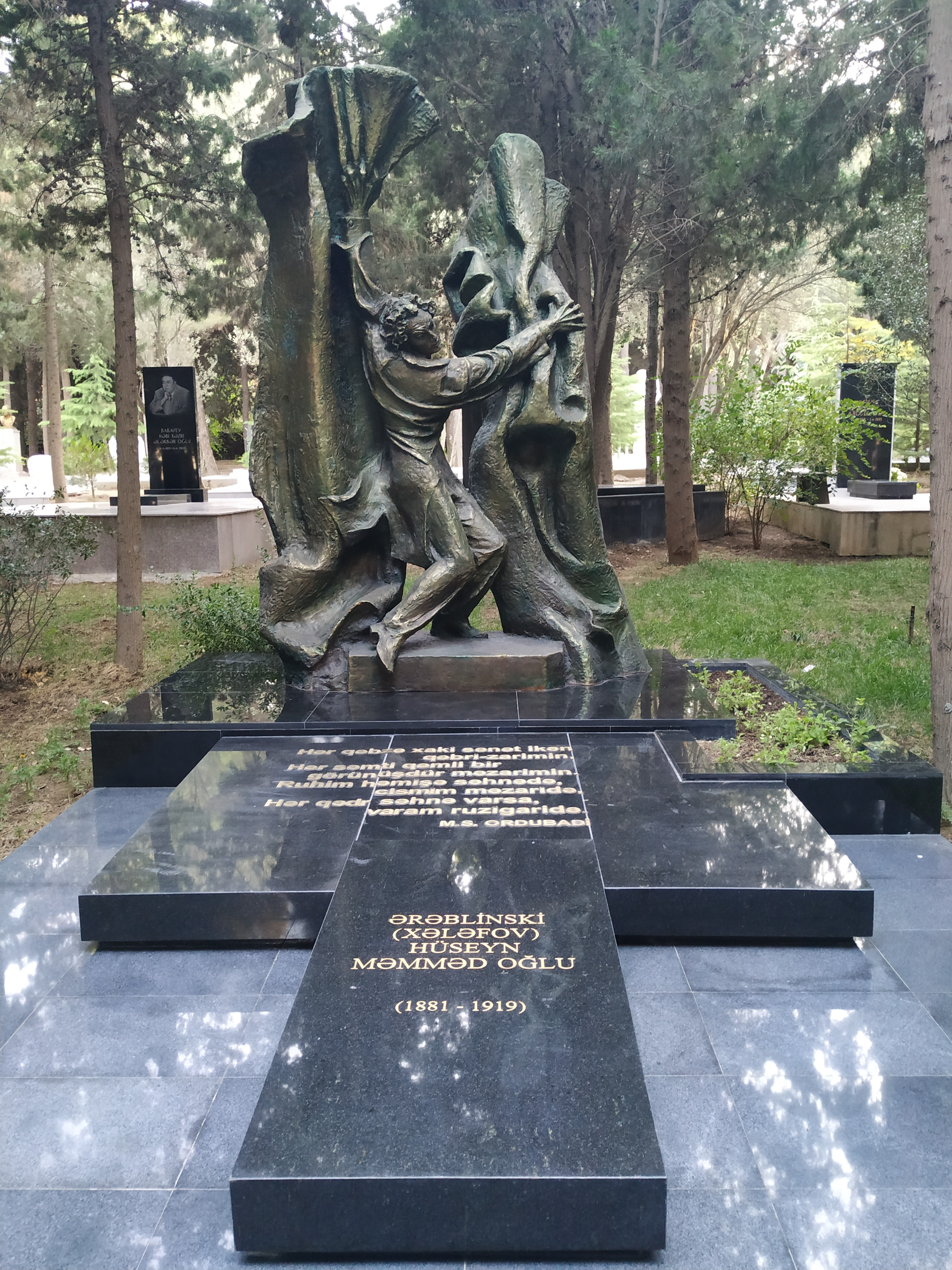 Hüseyn Ərəblinskinin məzarı